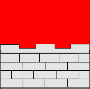 baron maire